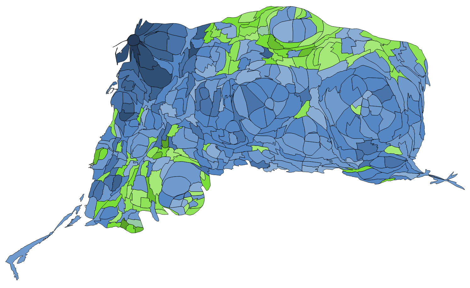 顏色對照表